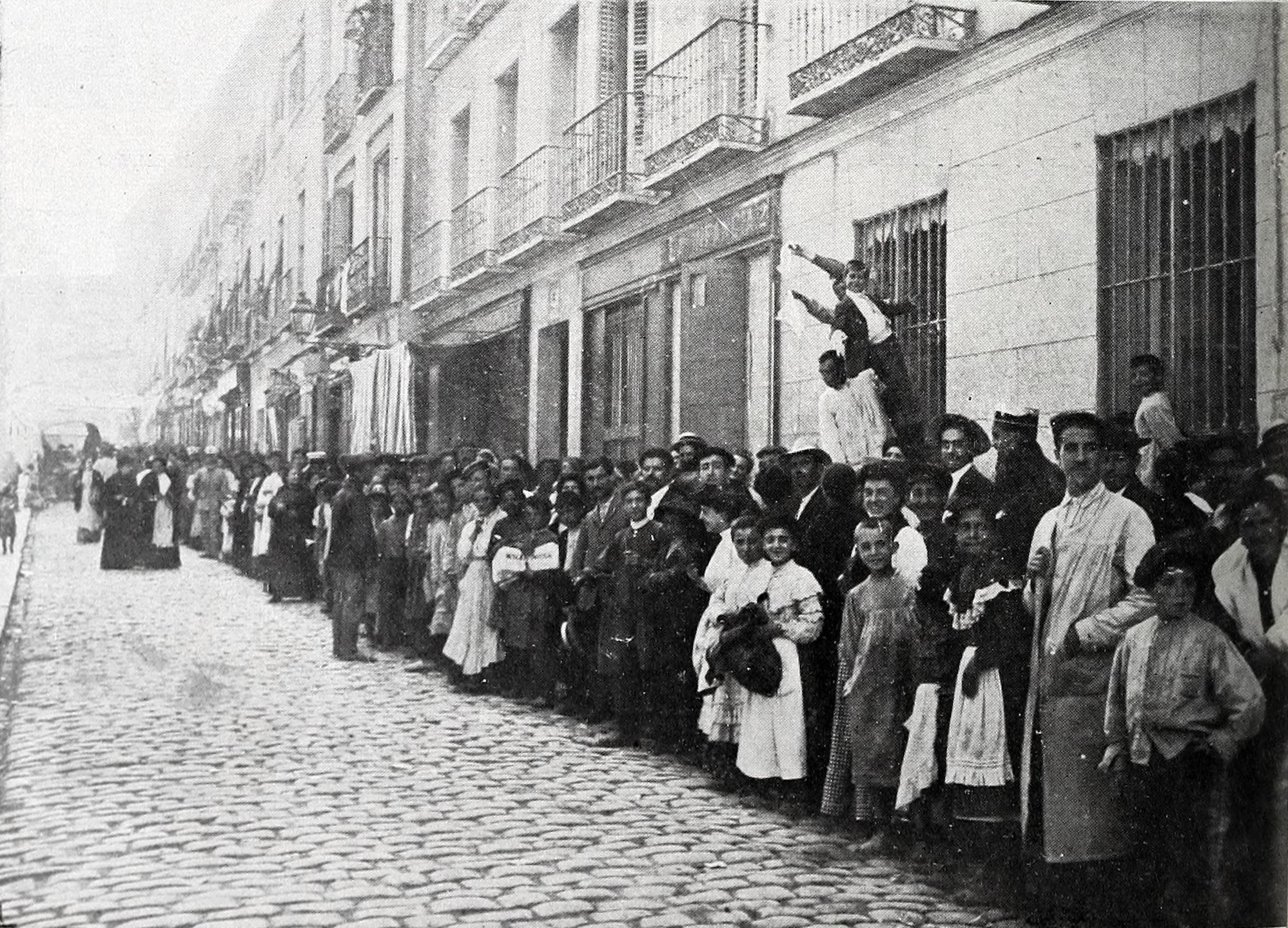 El público formando cola ante la puerta de una expenduría de cédulas, en Madrid.